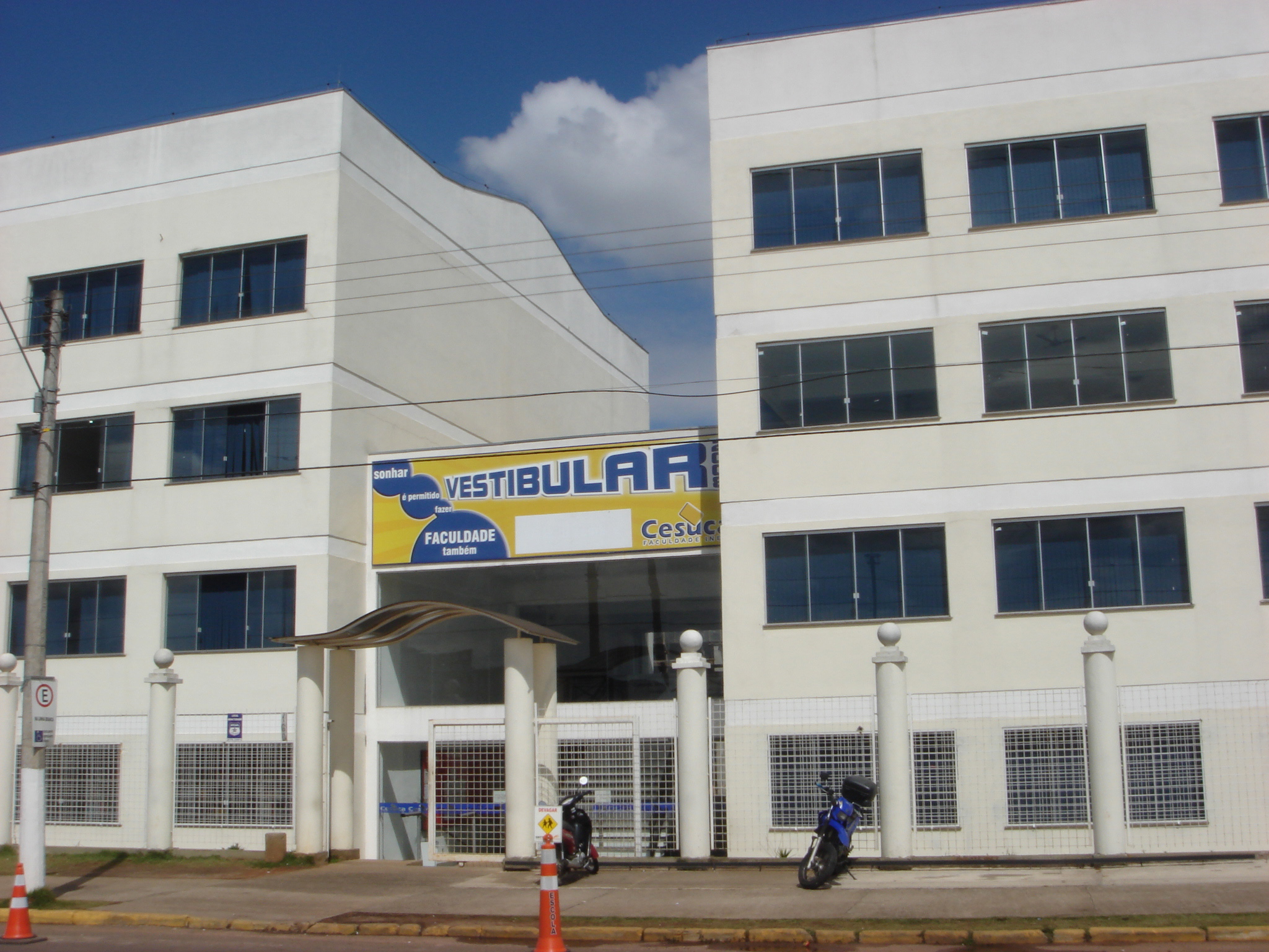 Fachada do Complexo de Ensino Superior de Cachoeirinha